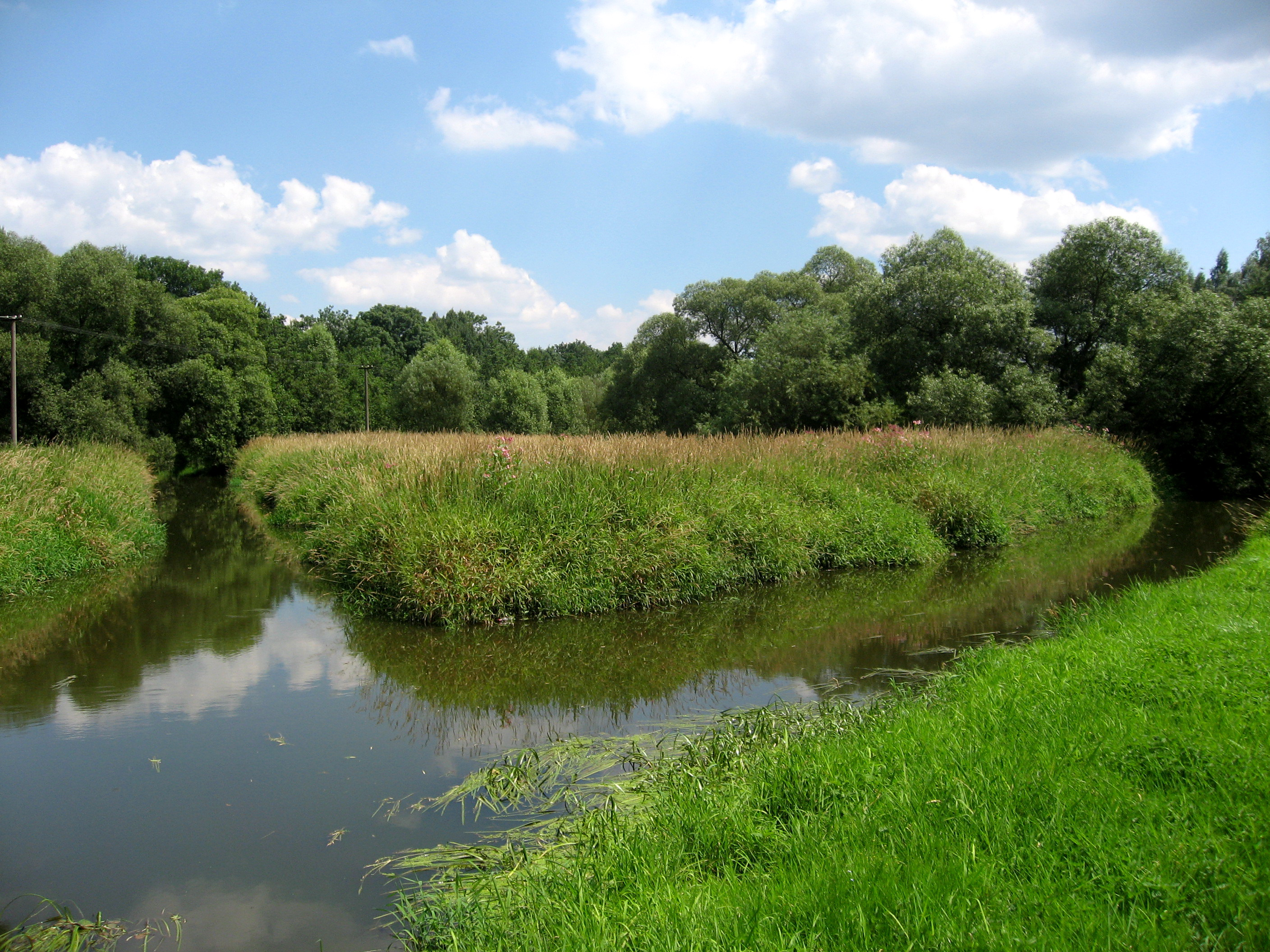 Šlapanka u mostu Za Lutriánem